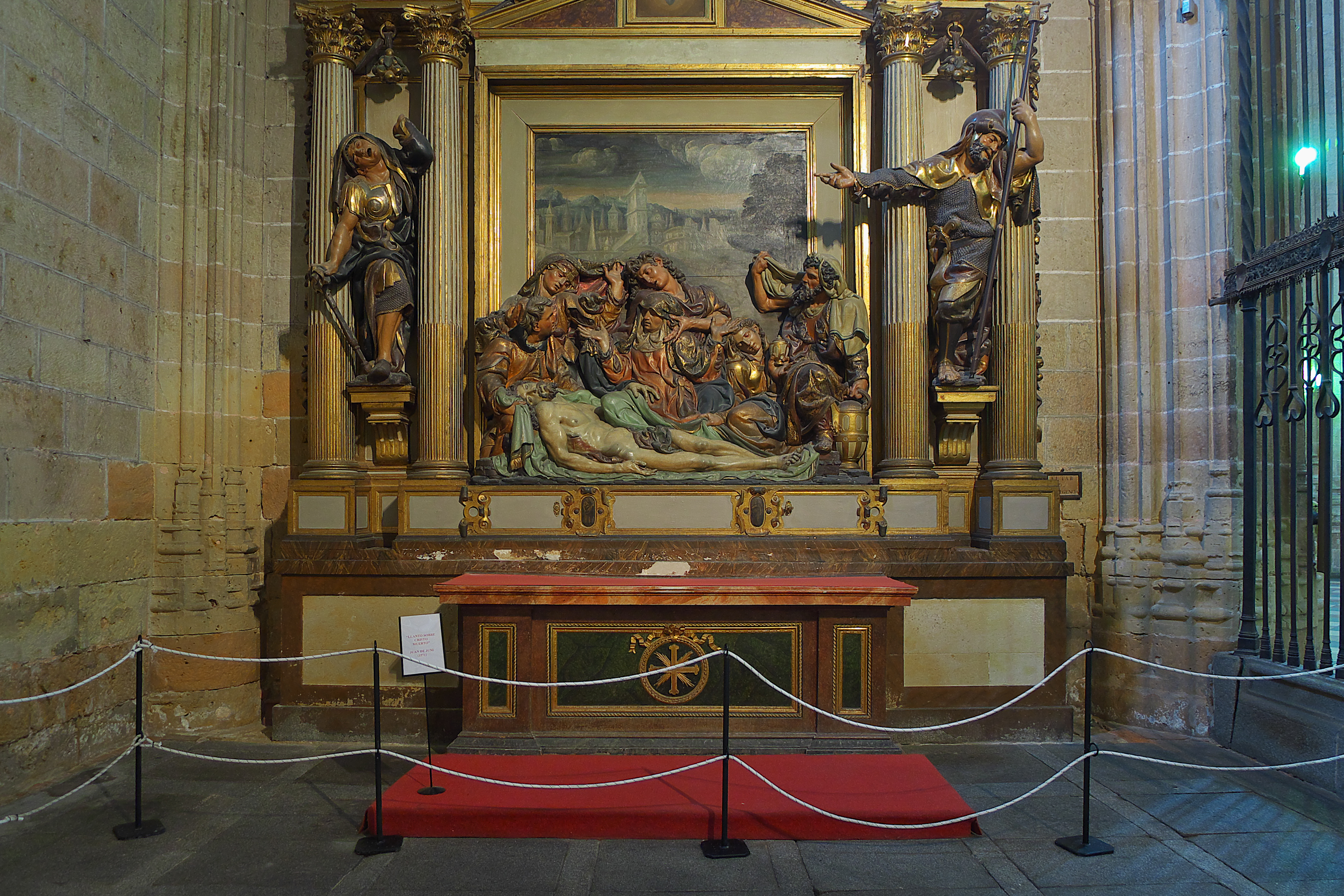 Juan de Juni, en plena madurez profesional (1571), acepta el encargo del mayordomo Juan Rodríguez de Noreña, para esculpir otro Santo Entierro. La obra, para algunos, eclipsada por la primitiva de Valladolid, es extraordinaria, así como la policromía.